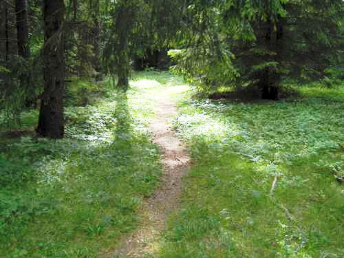 En bild från den norra, höglänta delen av Gullringskörrets naturreservat. Egentagen bild